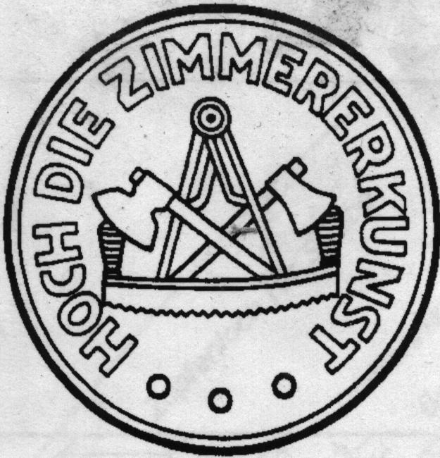 Zimmerersiegel